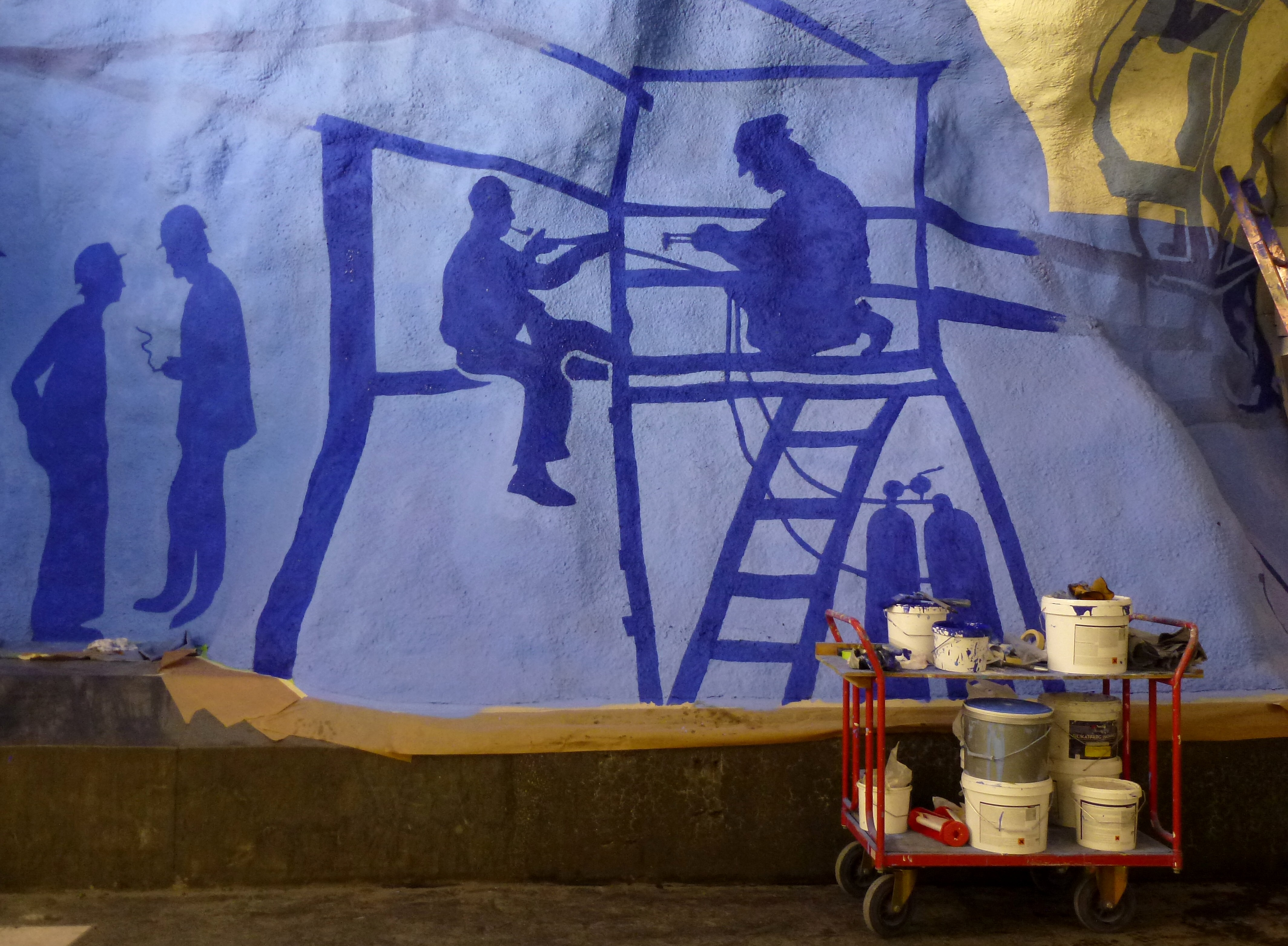 Ombgyggda perrongen för Citybanan Stockholm City Blå linje